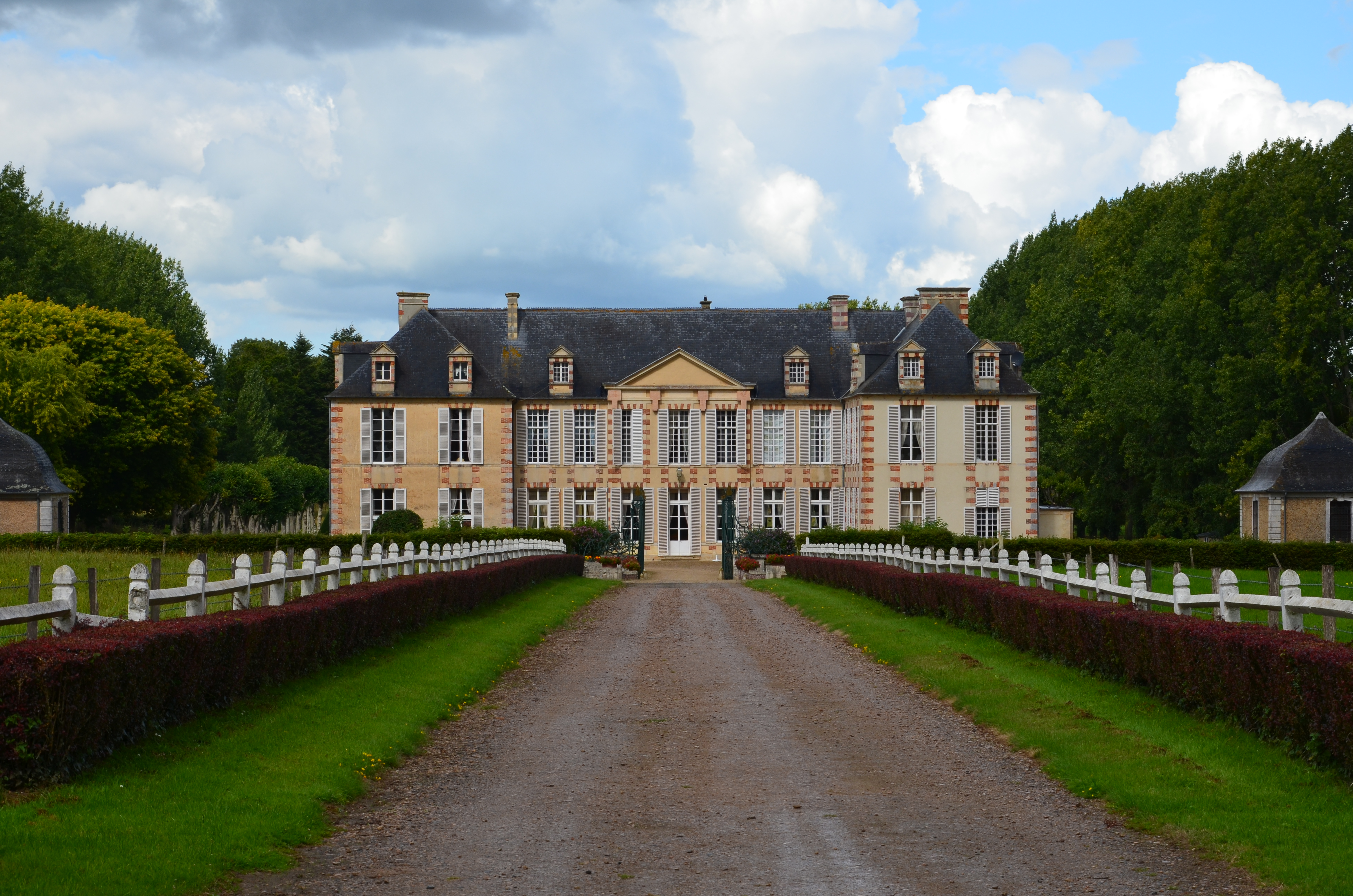 Château de Castilly.